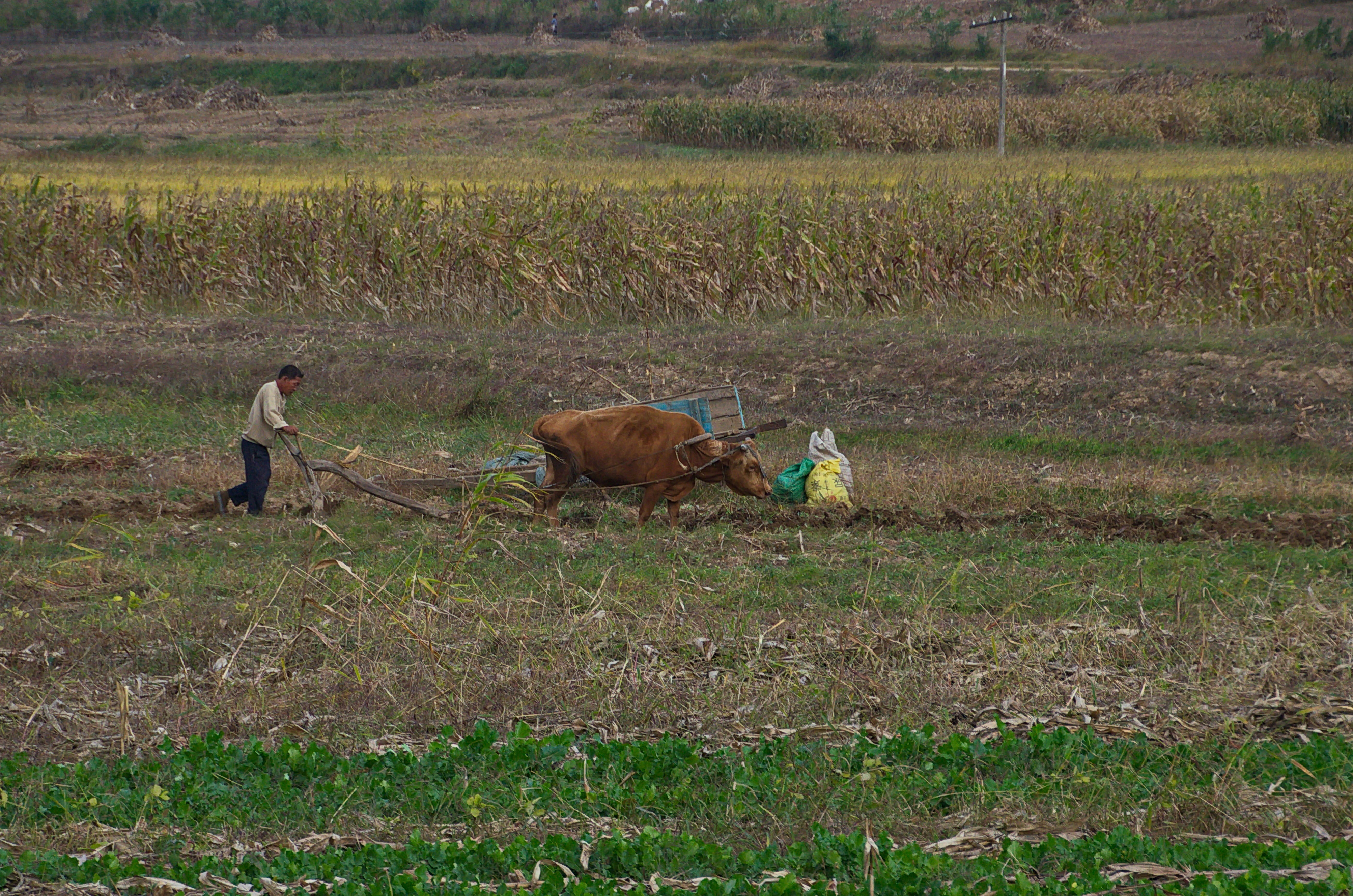 Nordkorea 2015 - von Nampo nach Käsong